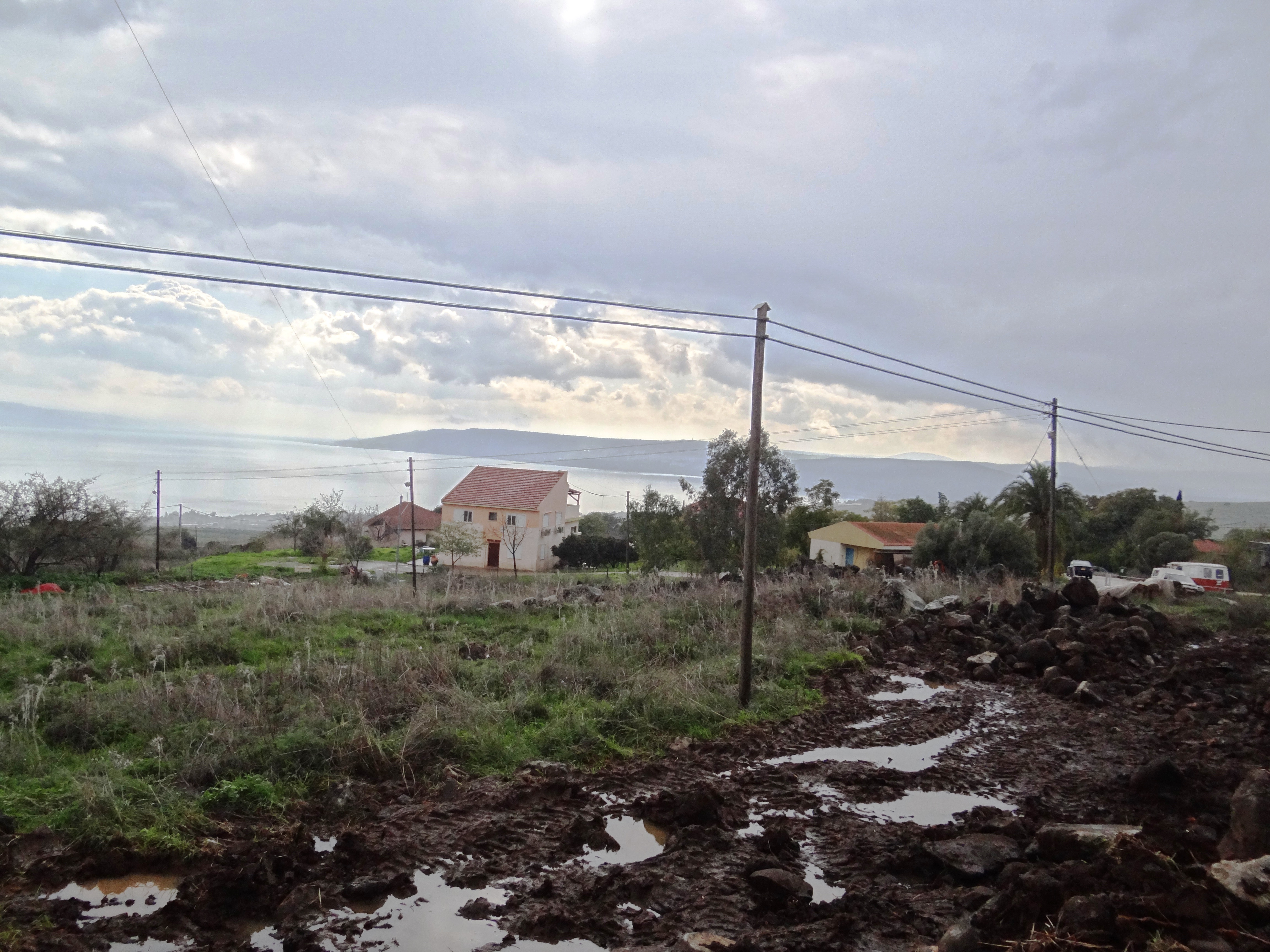 Amnun is a workers' moshav in the Upper Galilee in northern Israel. אַמְנוּן הוא מושב עובדים ברמת כורזים, מצפון לכפר נחום ולימת הכנרת, בתחום המועצה האזורית מבואות החרמון.